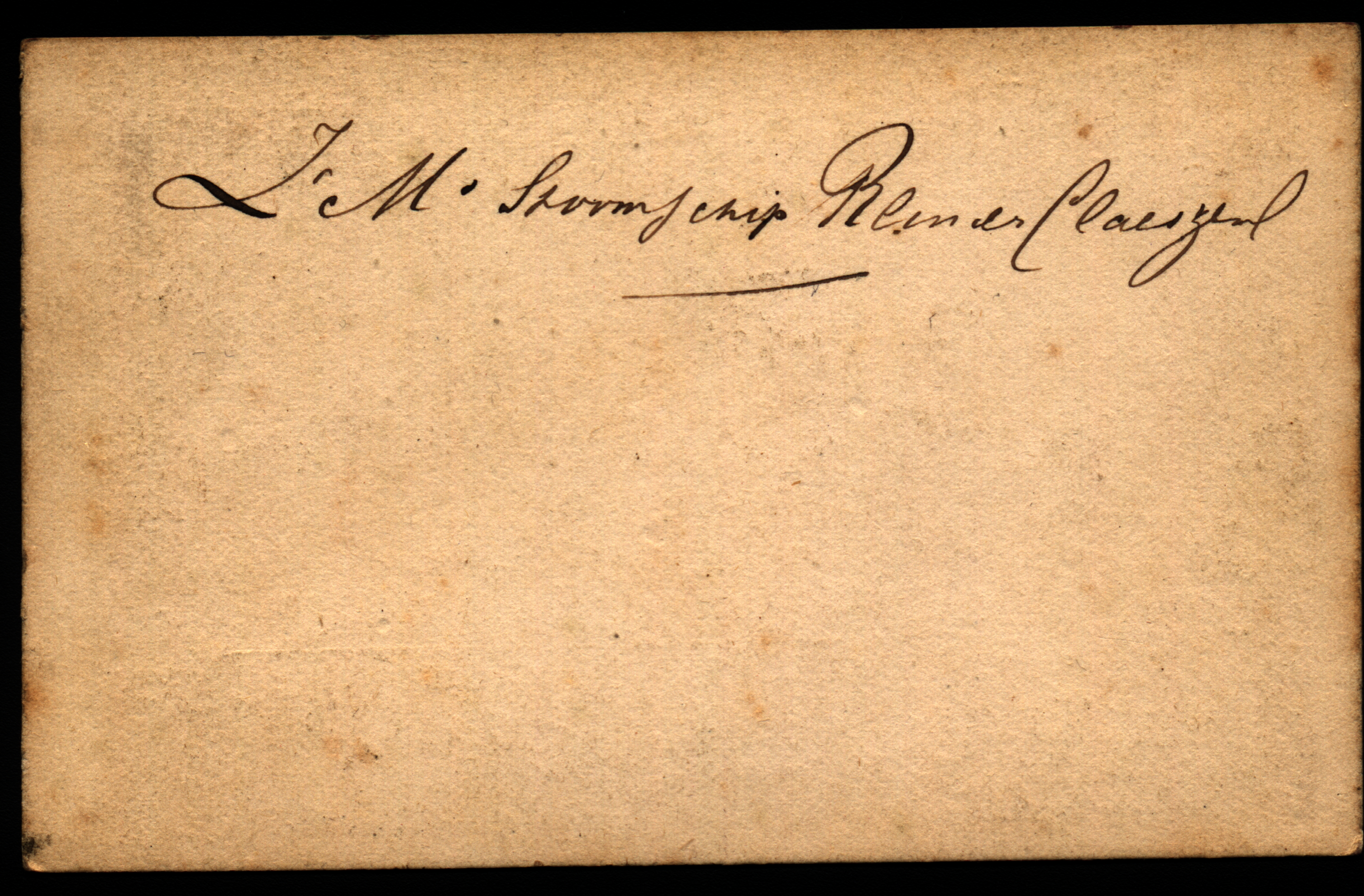 Achterkant oude foto ZM Schoefstoomschip Reinier Claeszen met in ouderwets handschrift 99,99% zeker de naam Reinier Claeszen(s)